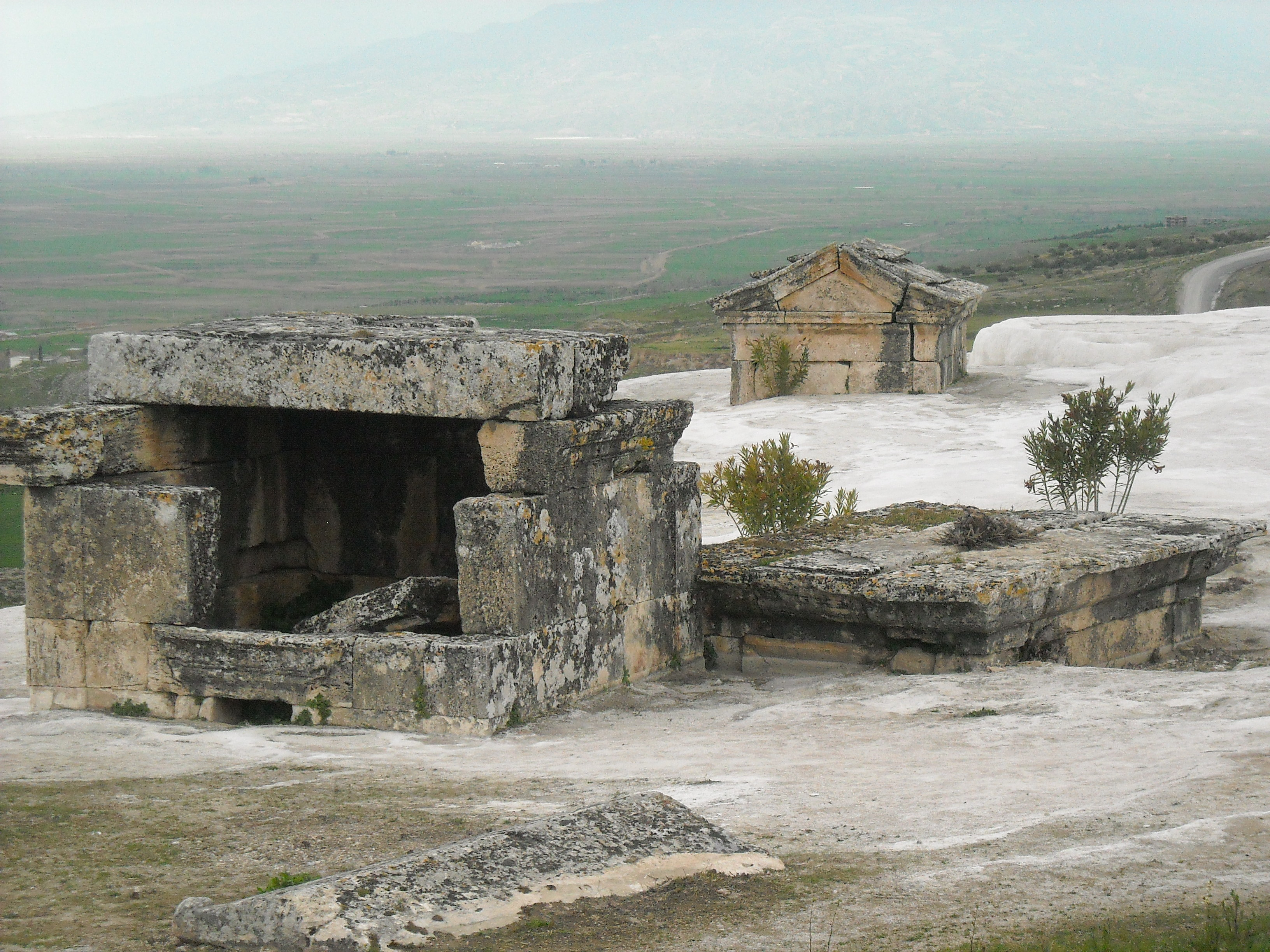 Nécropole de Hiérapolis - Pamukkale